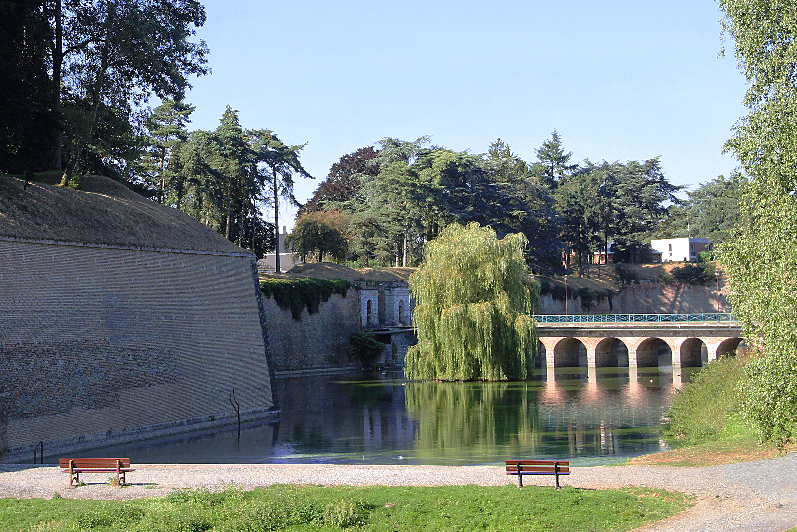 Pont dormant de la porte Fauroeulx - Citadelle Vauban de Le Quesnoy (Nord, France).